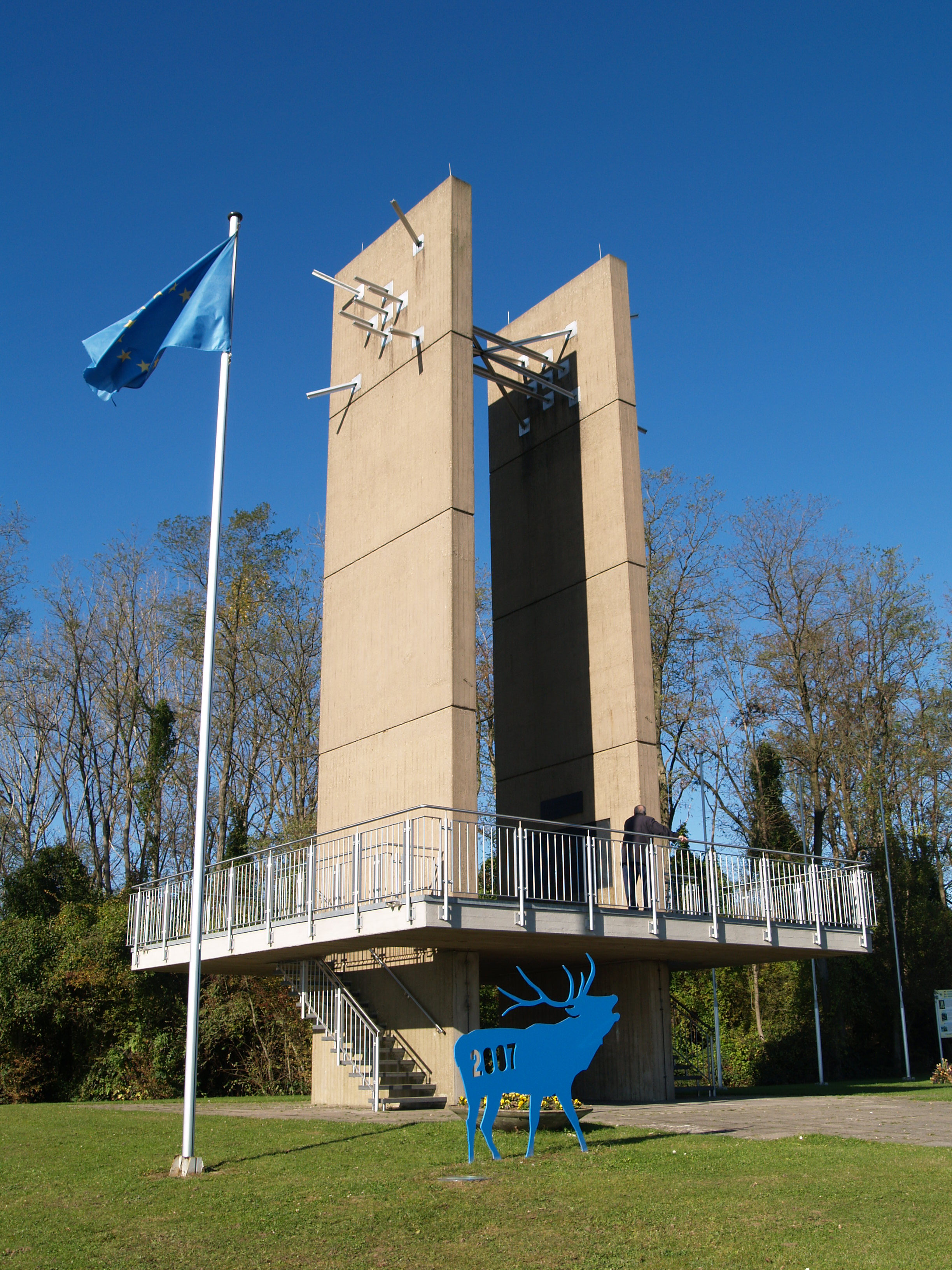 Europadenkmal, Berus Saar